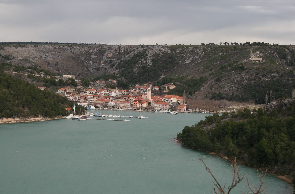 panorama Skradina slikana s vidilice odmorišta autoceste A1